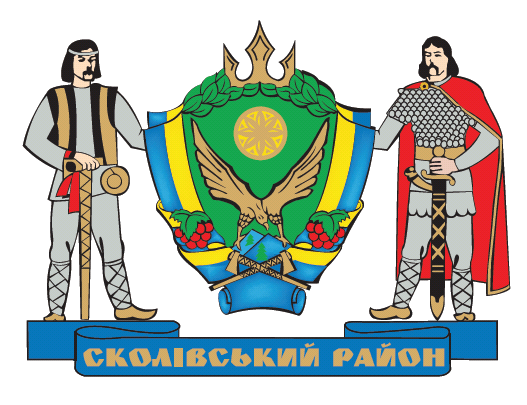 герб Сколівського району